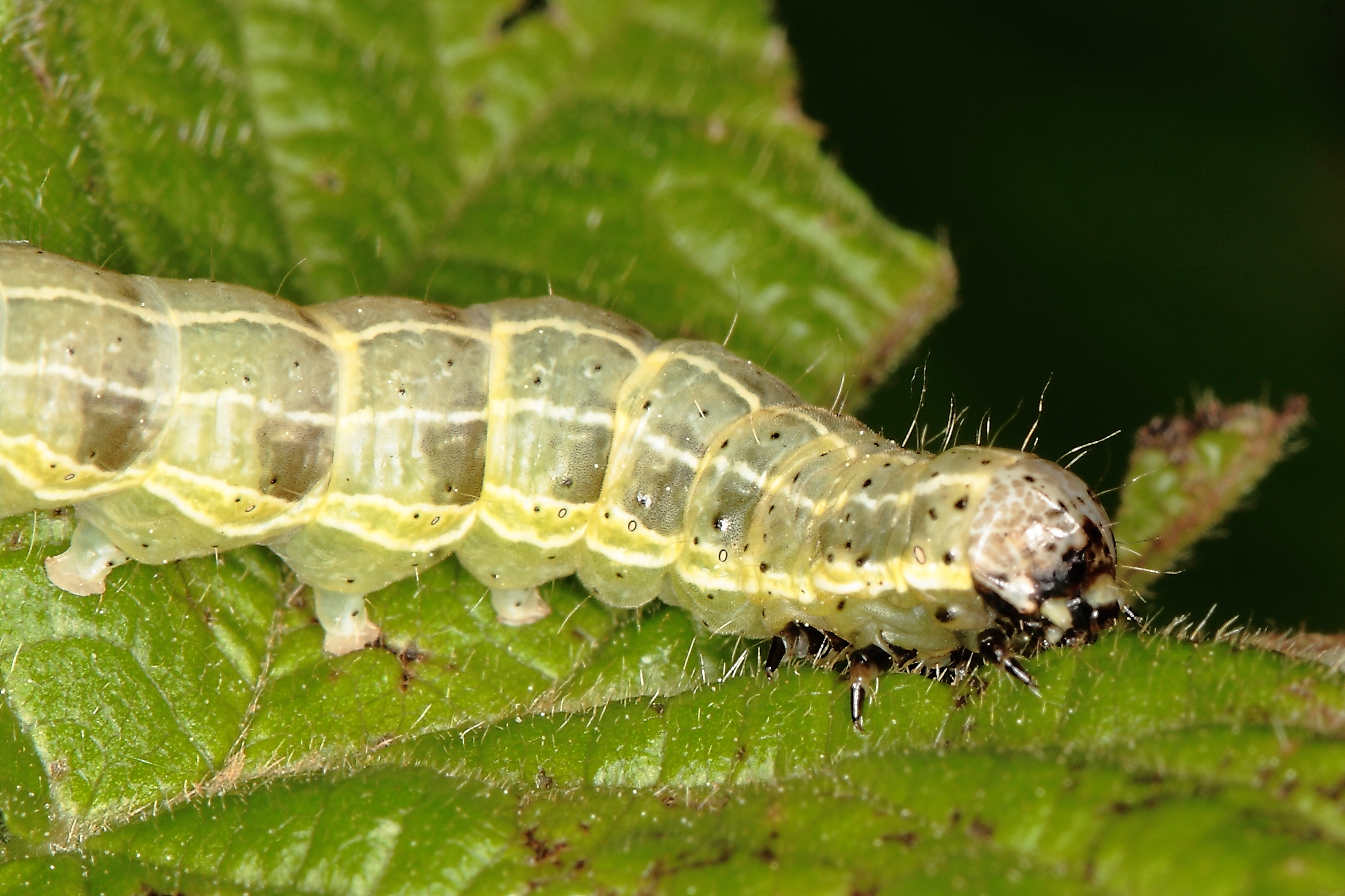 Mordraupe: Trapezeule (Cosmia trapezina), Sachsen, Bergwald (400 m ü. M.)